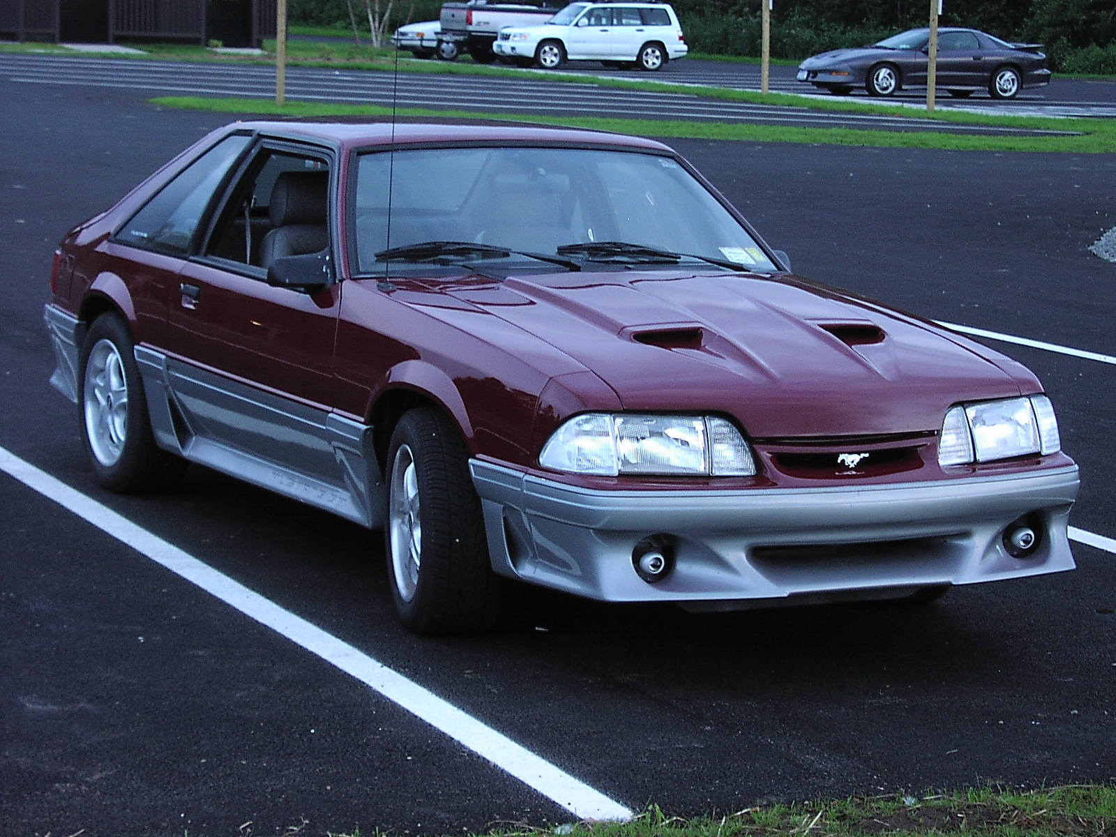 1987 Mustang GT